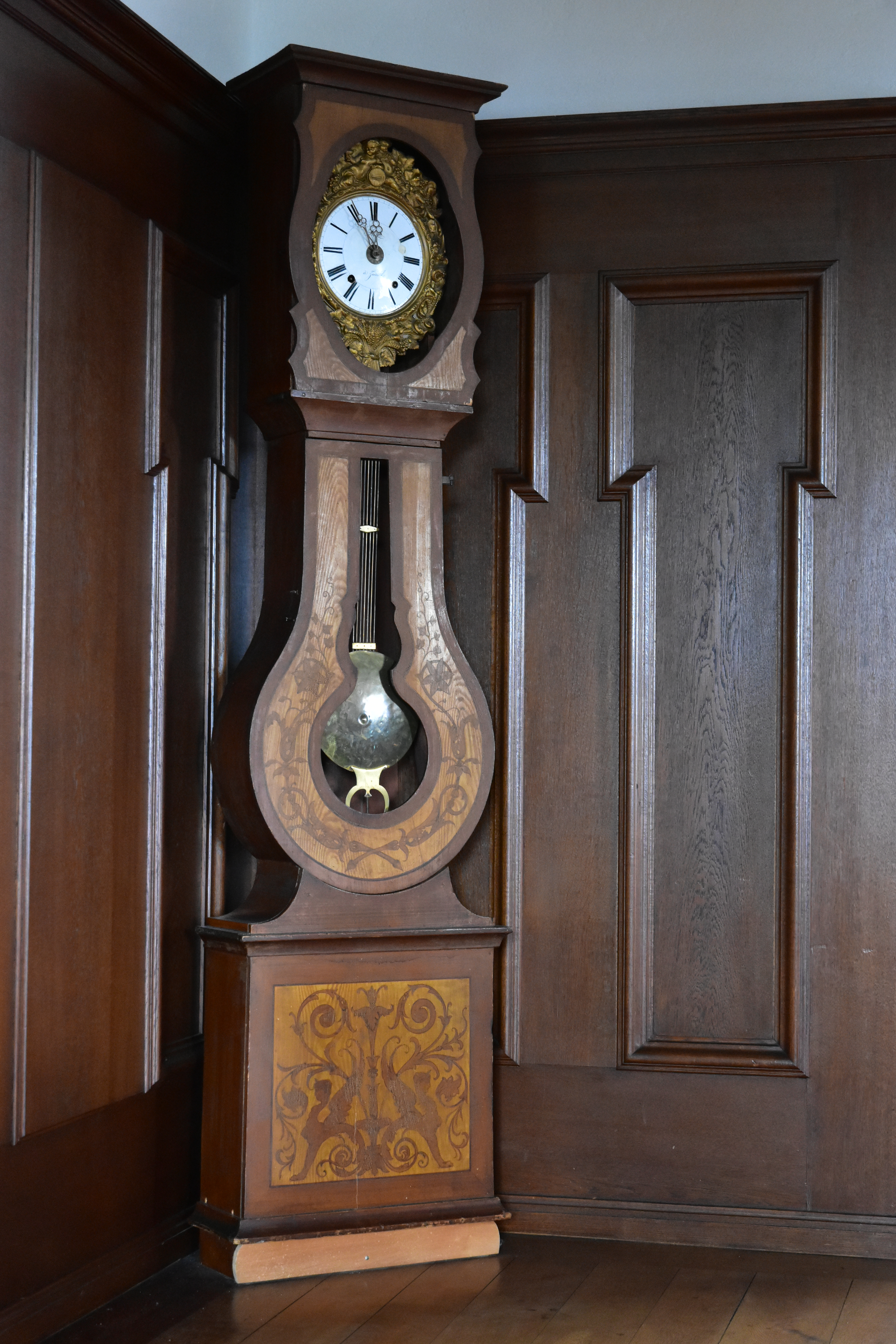 Schloss (Castle) in Uster (Switzerland)